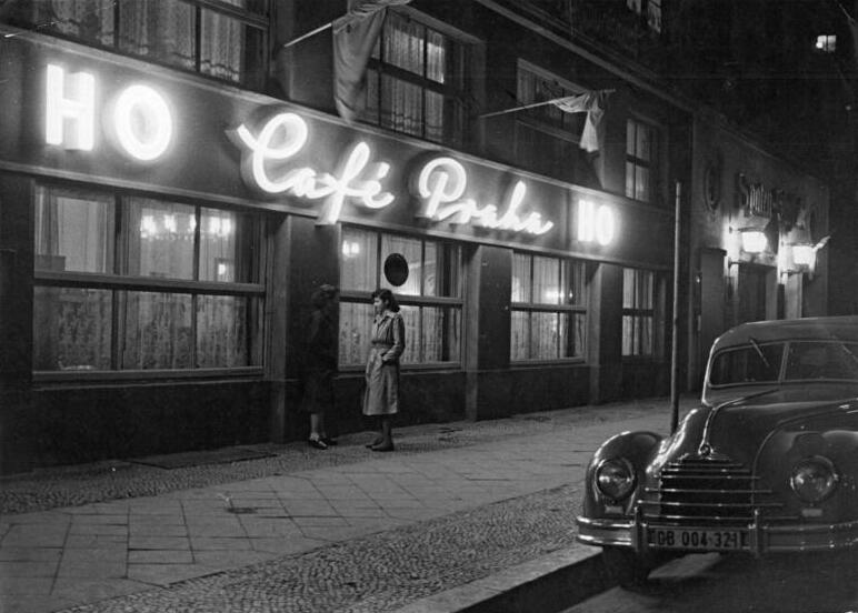 Berlin, Französische Straße, Café, Nacht Zentralbild Weiß 9.10.1952 Nächtliches Berlin UBz: Das HO- "Cafe Praha" in der Französischen Straße.